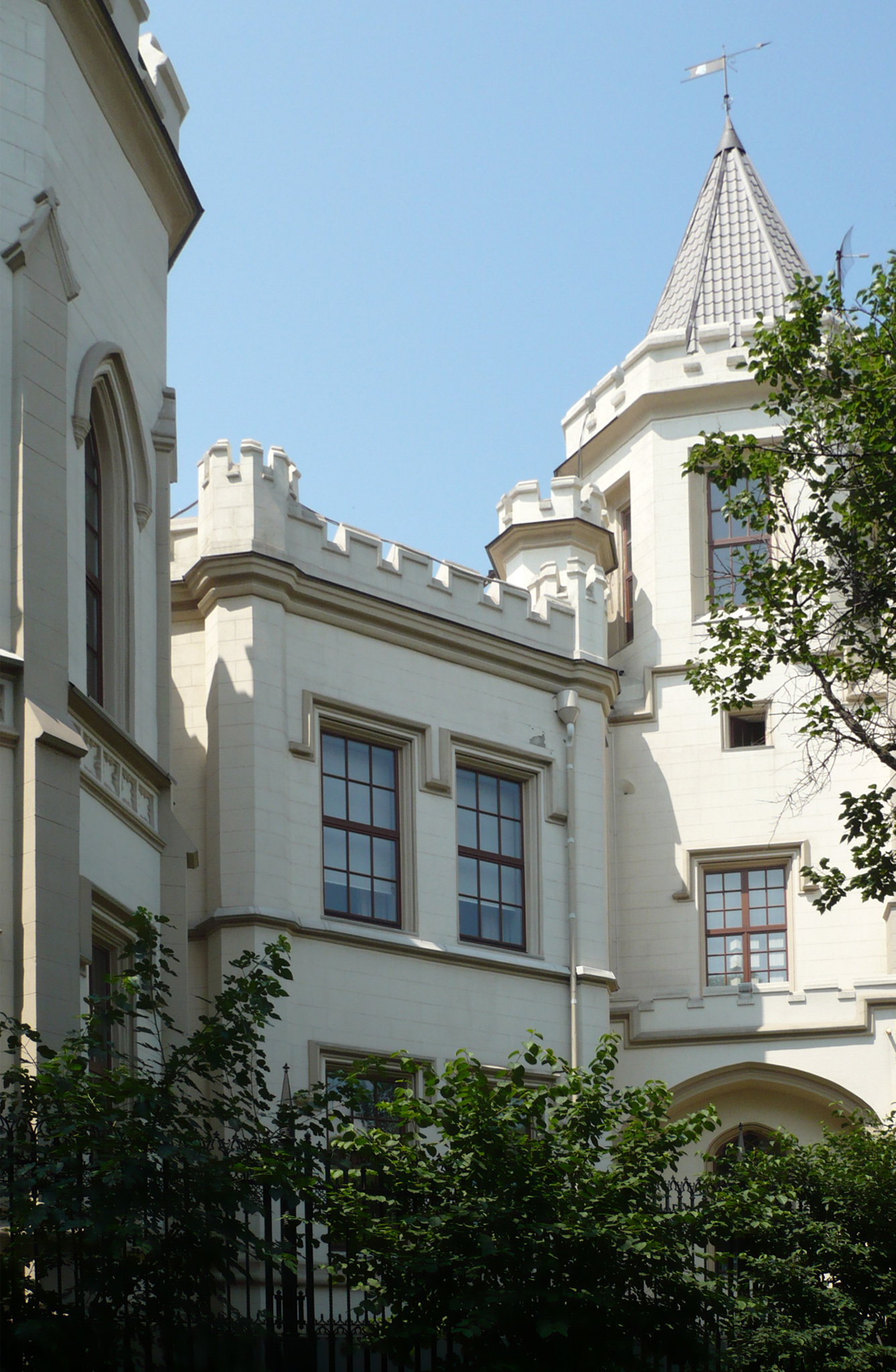 Pałac Beliny-Brzozowskiego, fragment